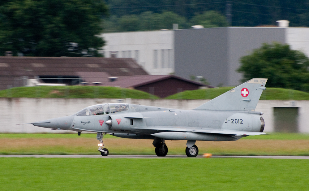 20100724-_DSC8733